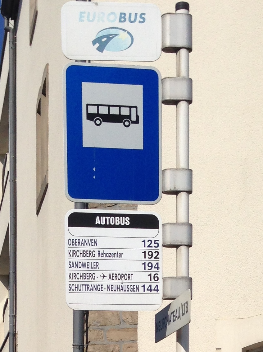 Arrêt d'autobus avec le logo "Eurobus" (2013)